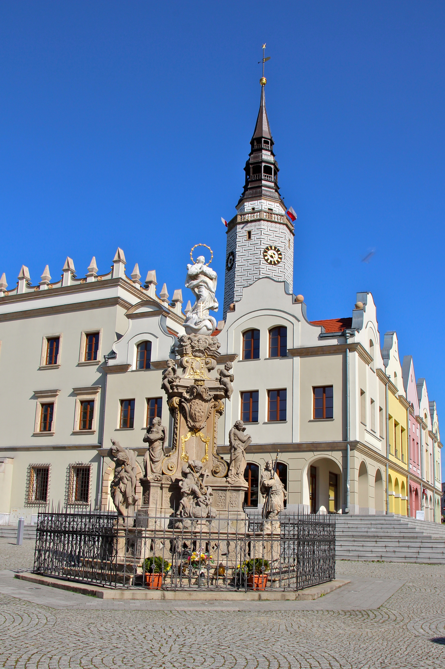 Głubczyce - Ratusz miejski i barokowa kolumna maryjna na rynku głubczyckim.